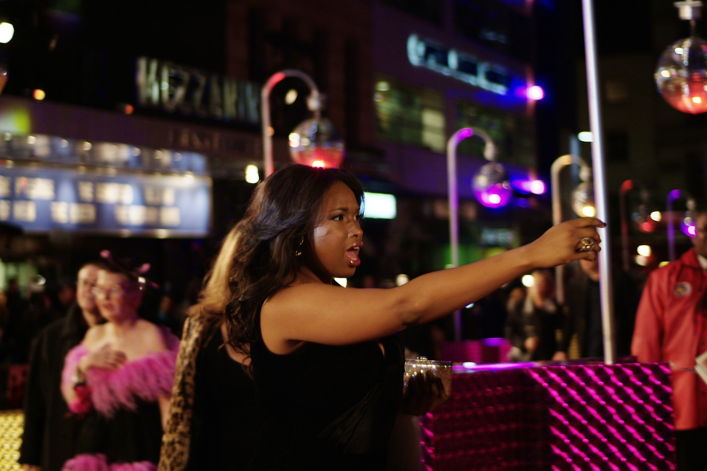 Jeniffer Hudson